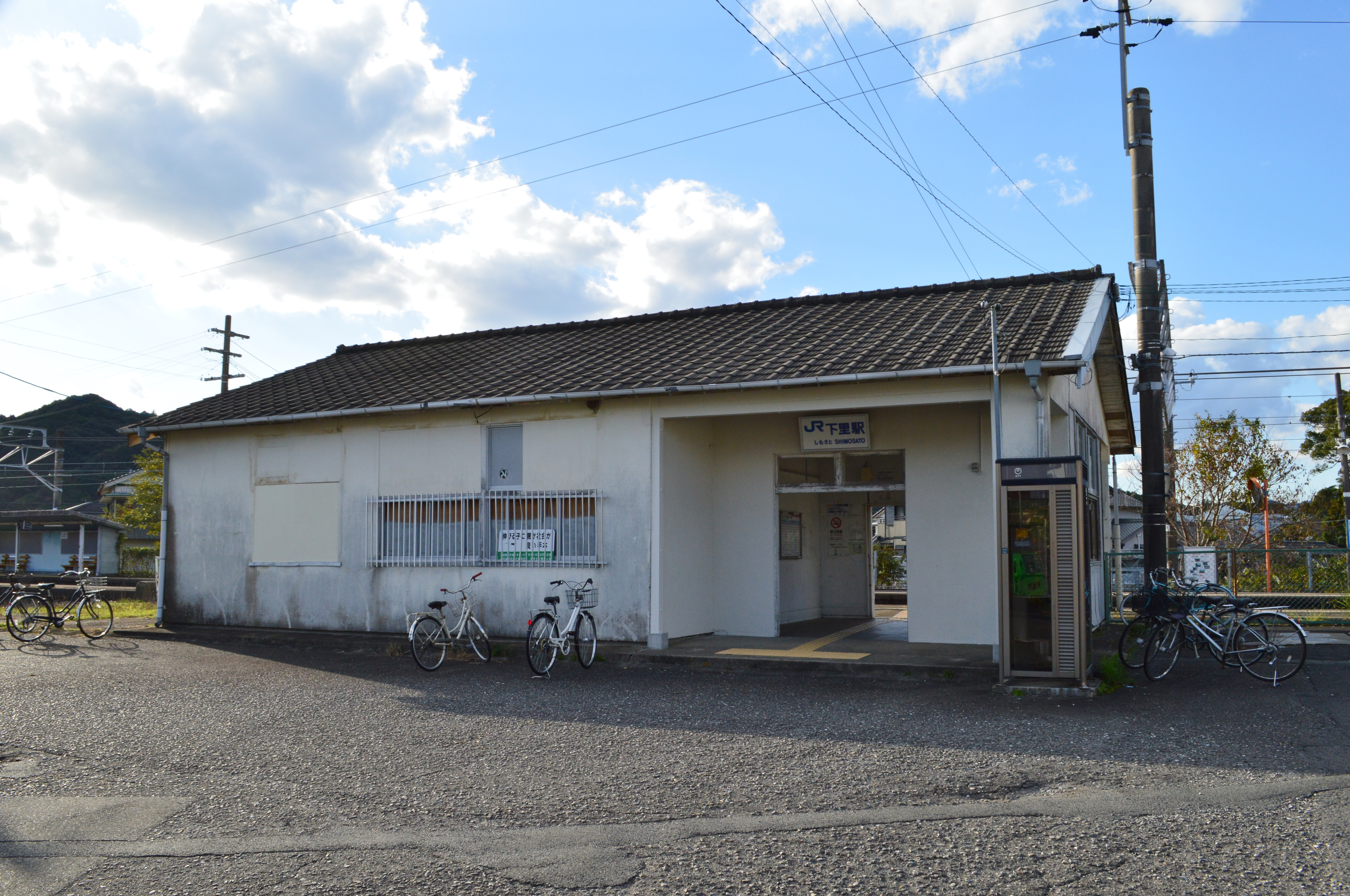 下里駅 駅舎